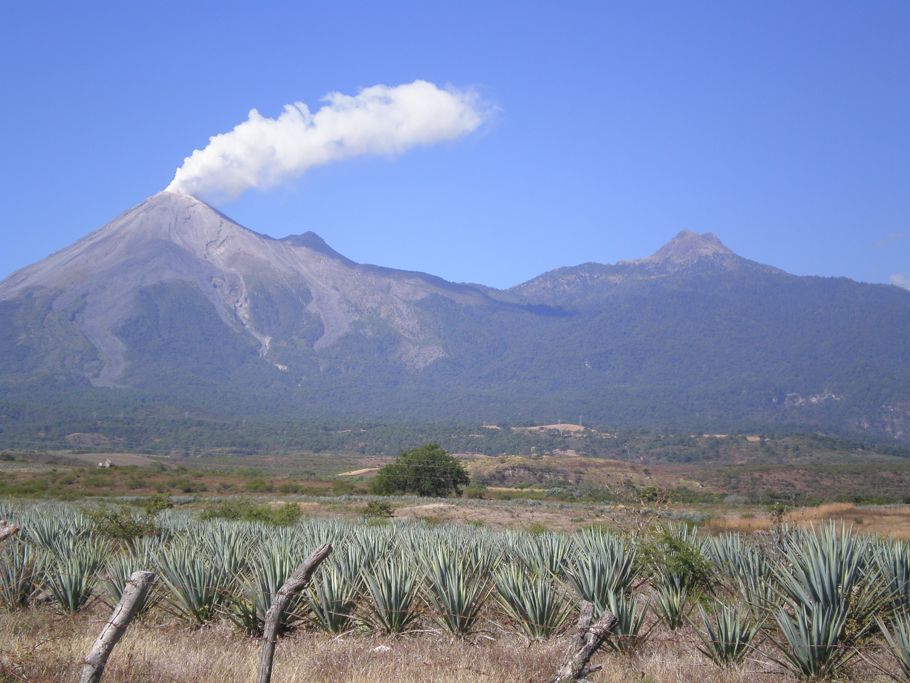 VISTA DESDE EL JONDEADERO